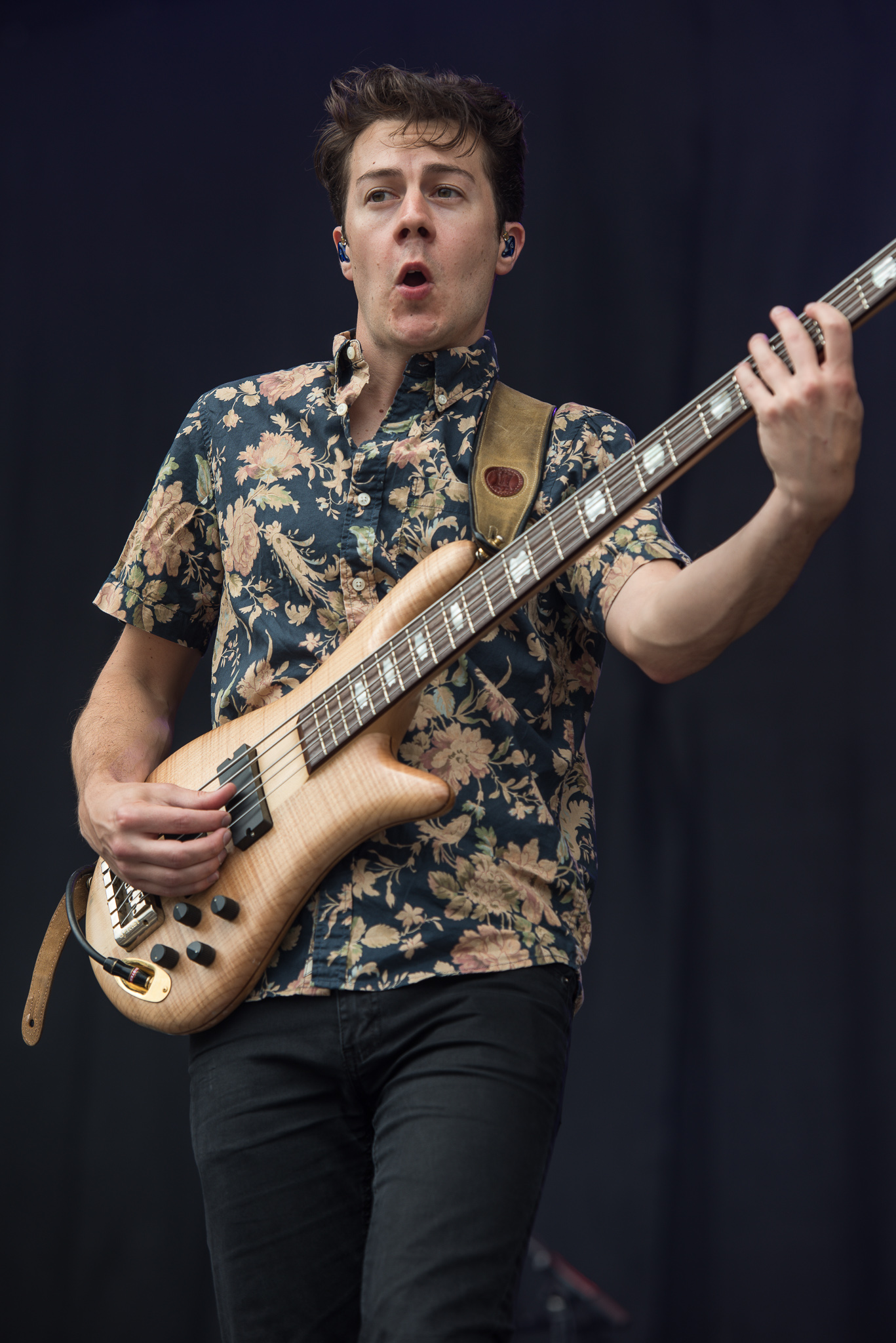 ARGO-Konzerte,Beck's Park Stage,Don Broco,Konzert,Livekonzert,Livemusik,Musik,RiP,Rock im Park 2017,Tom Doyle